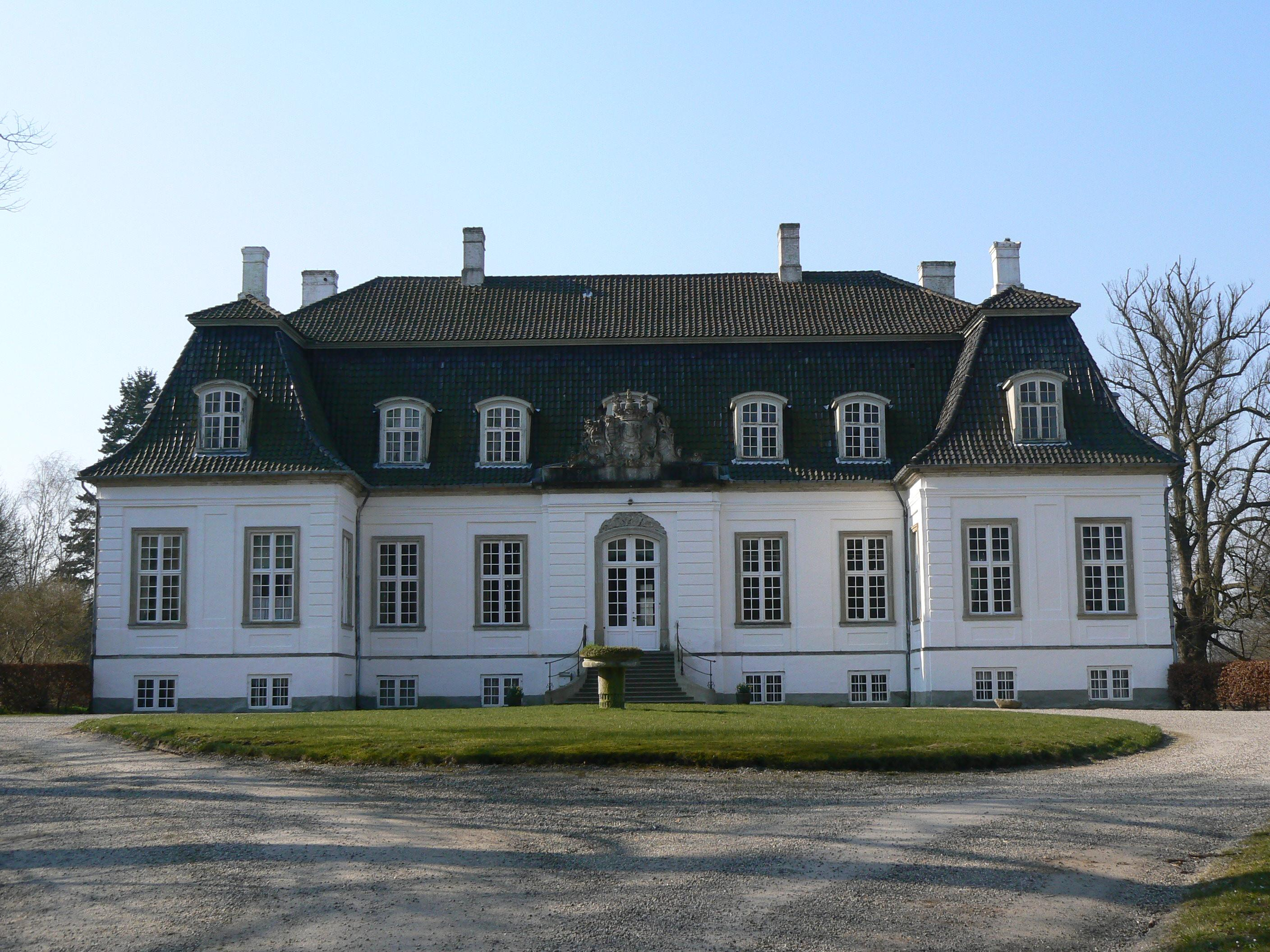 Frederiksdal Slot north of Copenhagen, Denmark